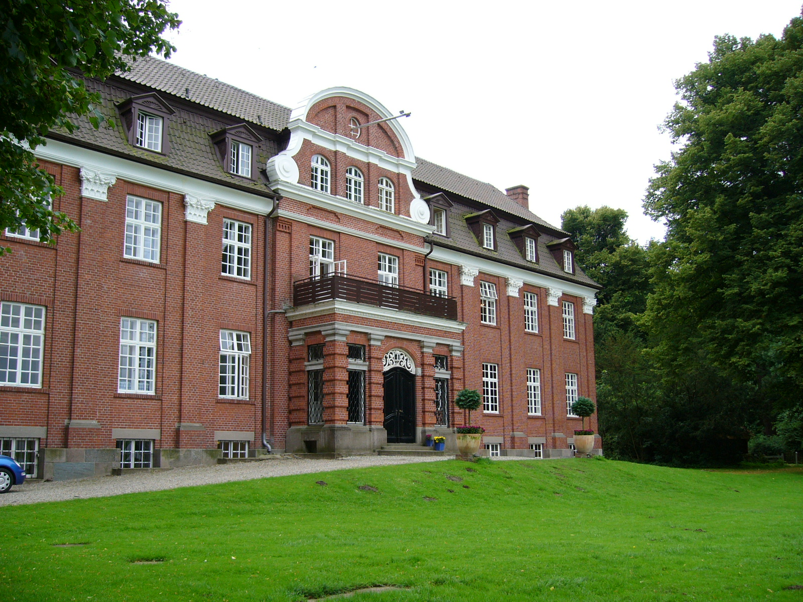 Herrenhaus des Gutes Rohlstorf am Wardersee.